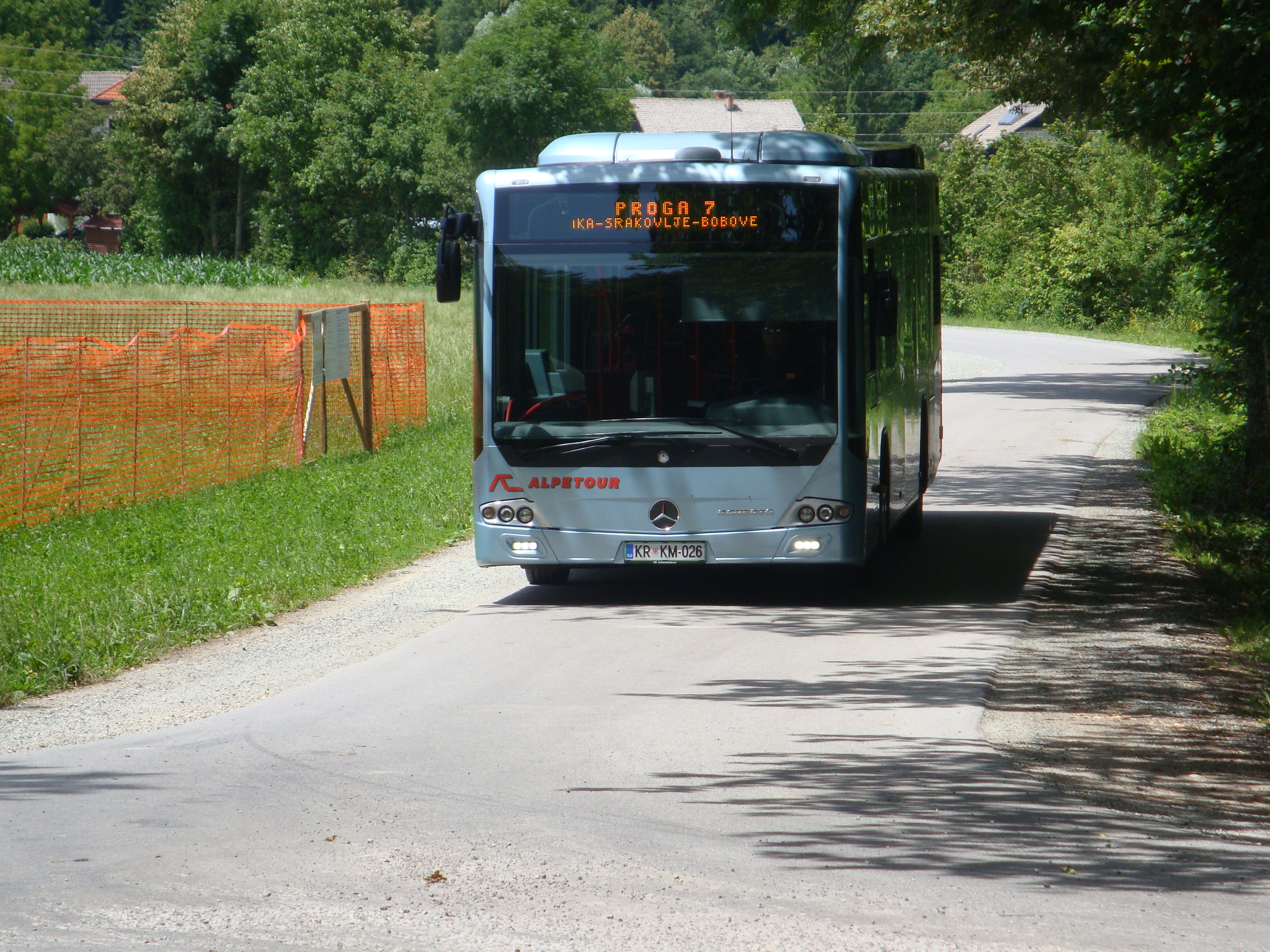 Kranjski mestni avtobus podjetja Alpetour na progi št. 7 v Srakovljah.